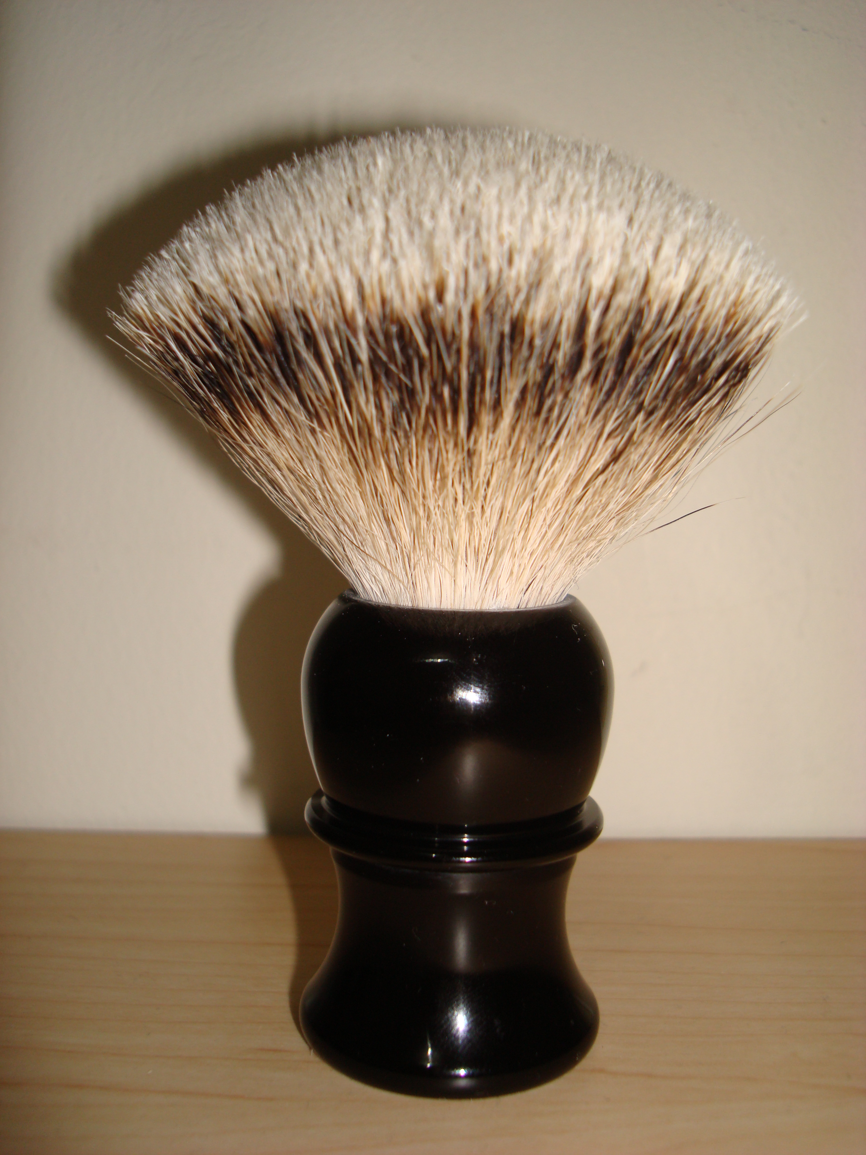 Brocha de afeitar